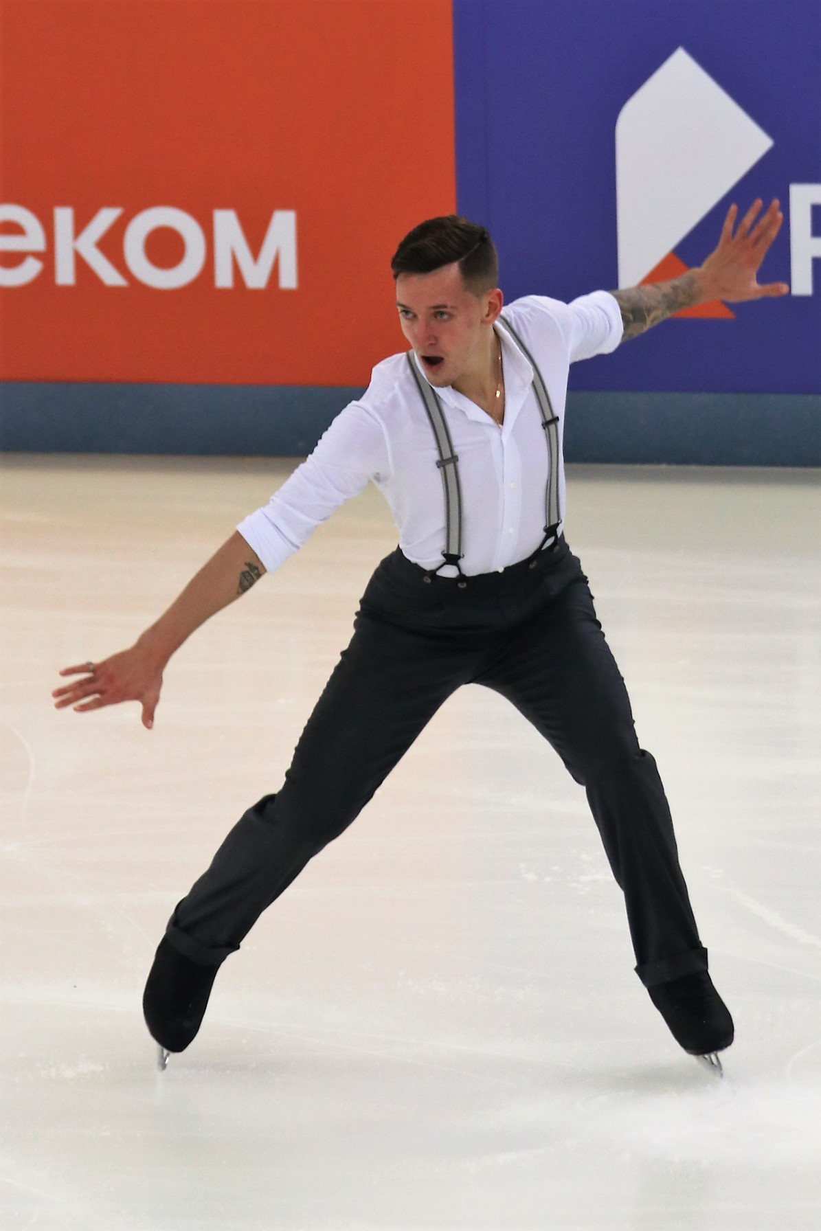 Максим Ковтун на чемпионате России по фигурному катанию на коньках 2019